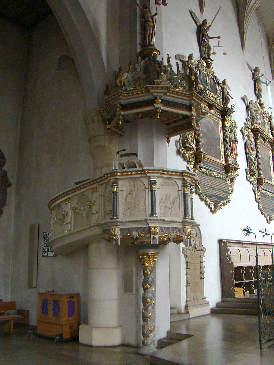 Kanzel der Martinskirche in Kirchheim unter Teck